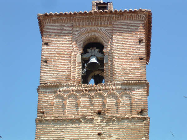 Iglesia parroquial de San Bartolomé, Mesegar de Tajo (Toledo)